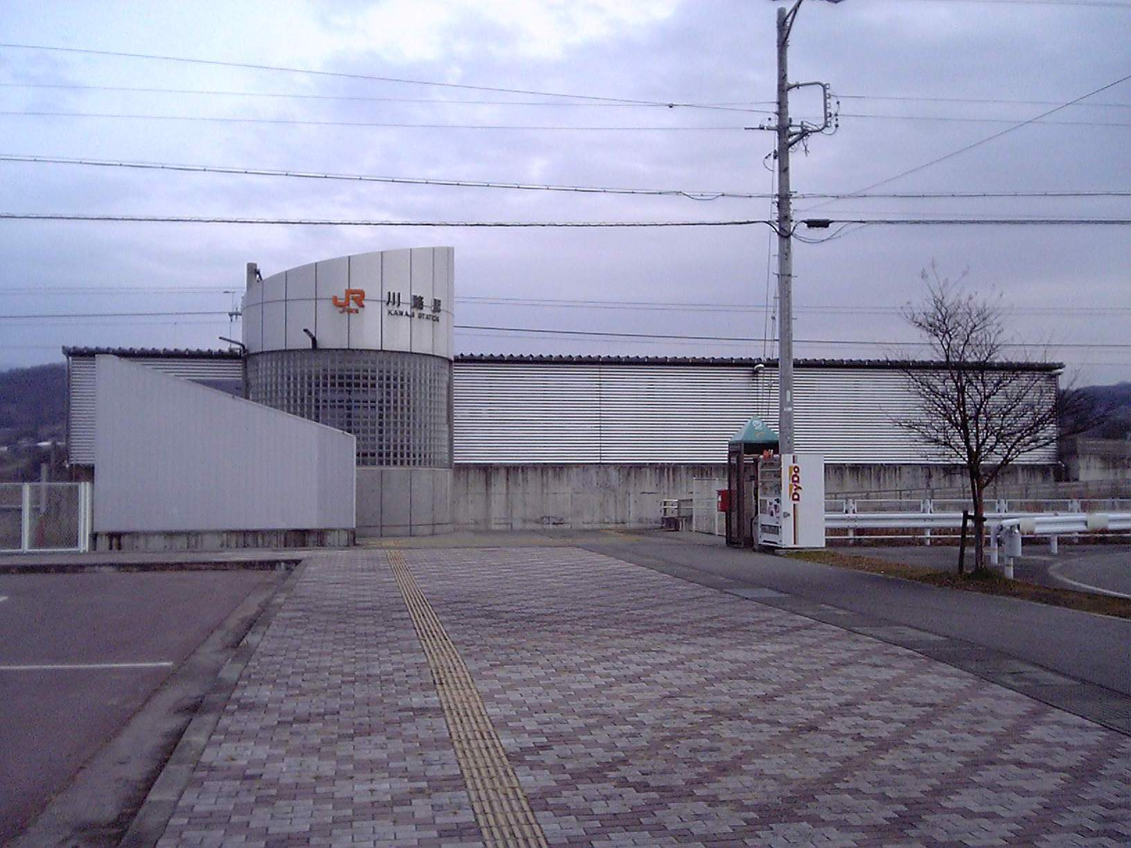 川路駅駅舎